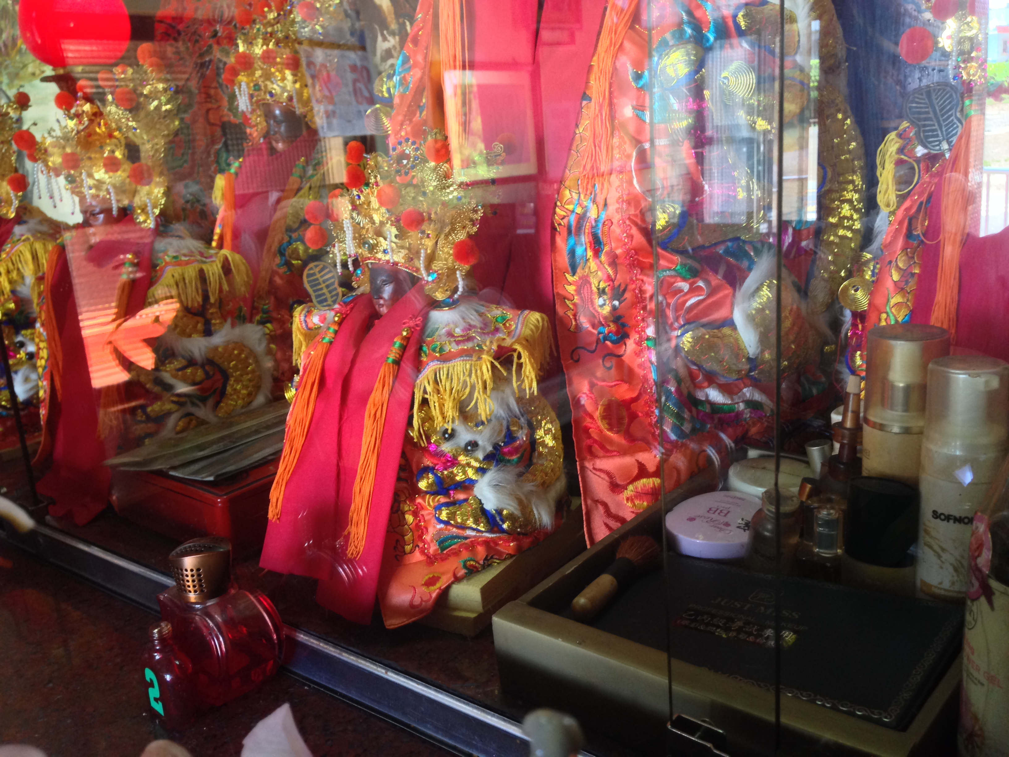 中文（台灣）: 林邊慈貞宮潘姑娘廟神像